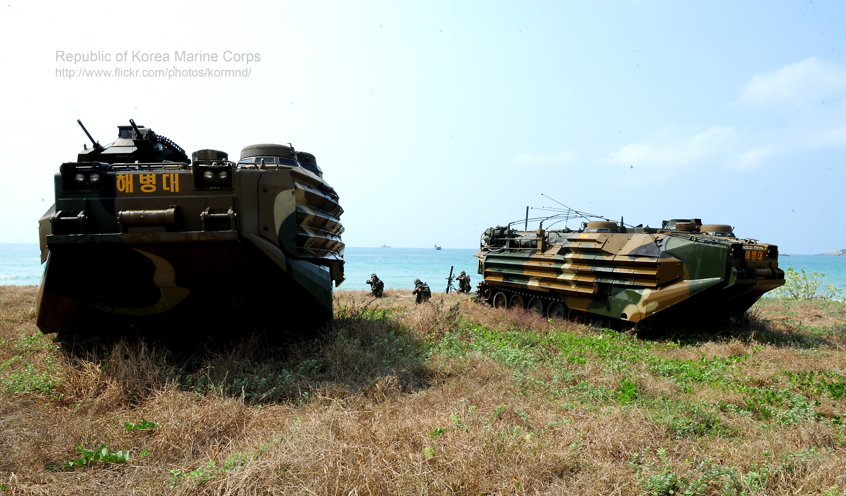 촬영 -상사 김영식